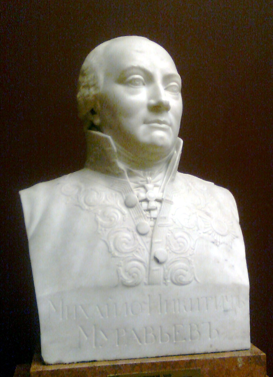 Демут-Малиновский Василий Иванович. Бюст М.Н. Муравьева. Конец 1810-х.Мрамор.61 х 44 х 32 Государственный Русский музей, Санкт-Петербург